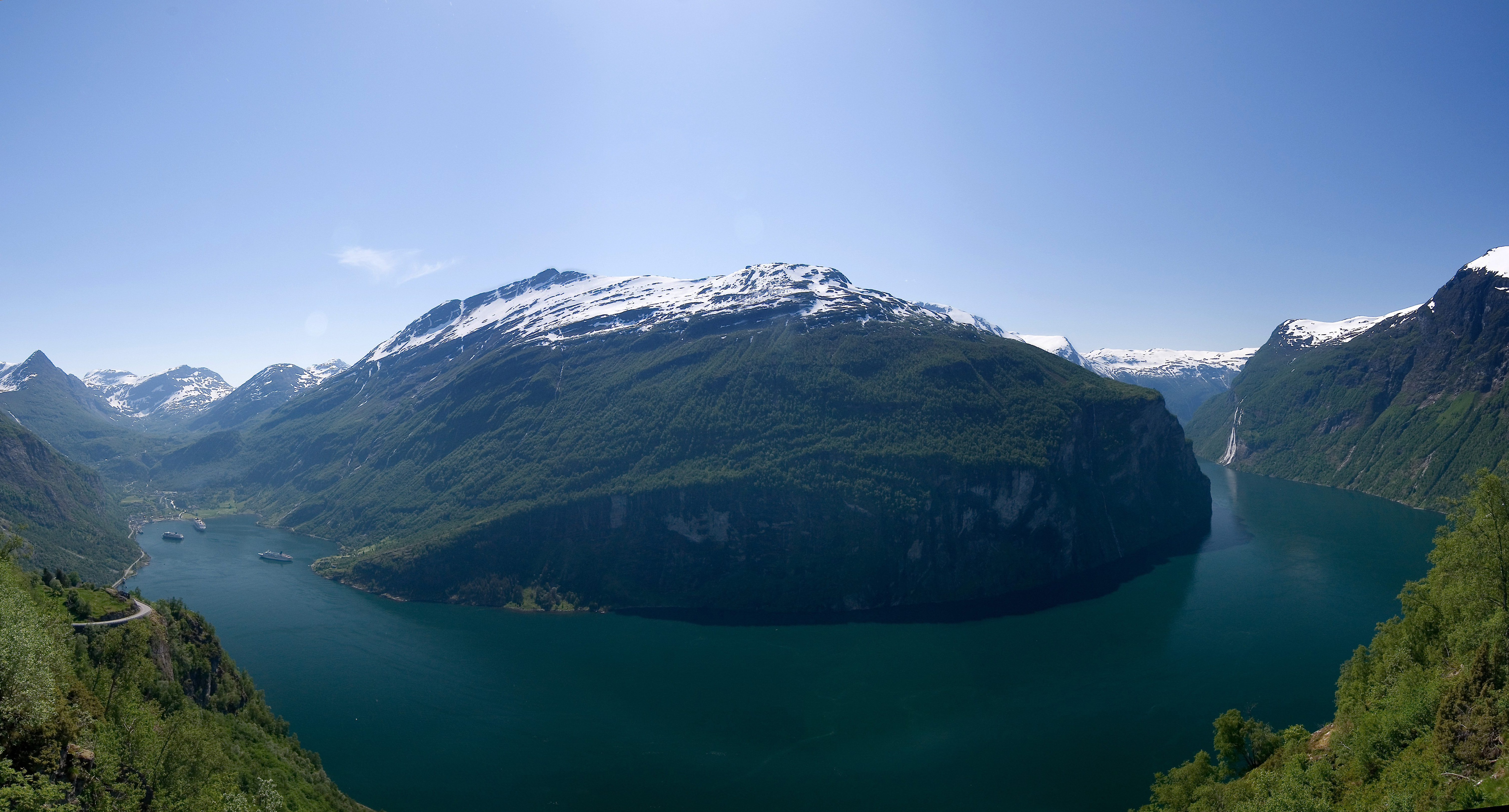 Panorama vom Geirangerfjord. Aufgenommen von der Plattform an der Adlerstraße